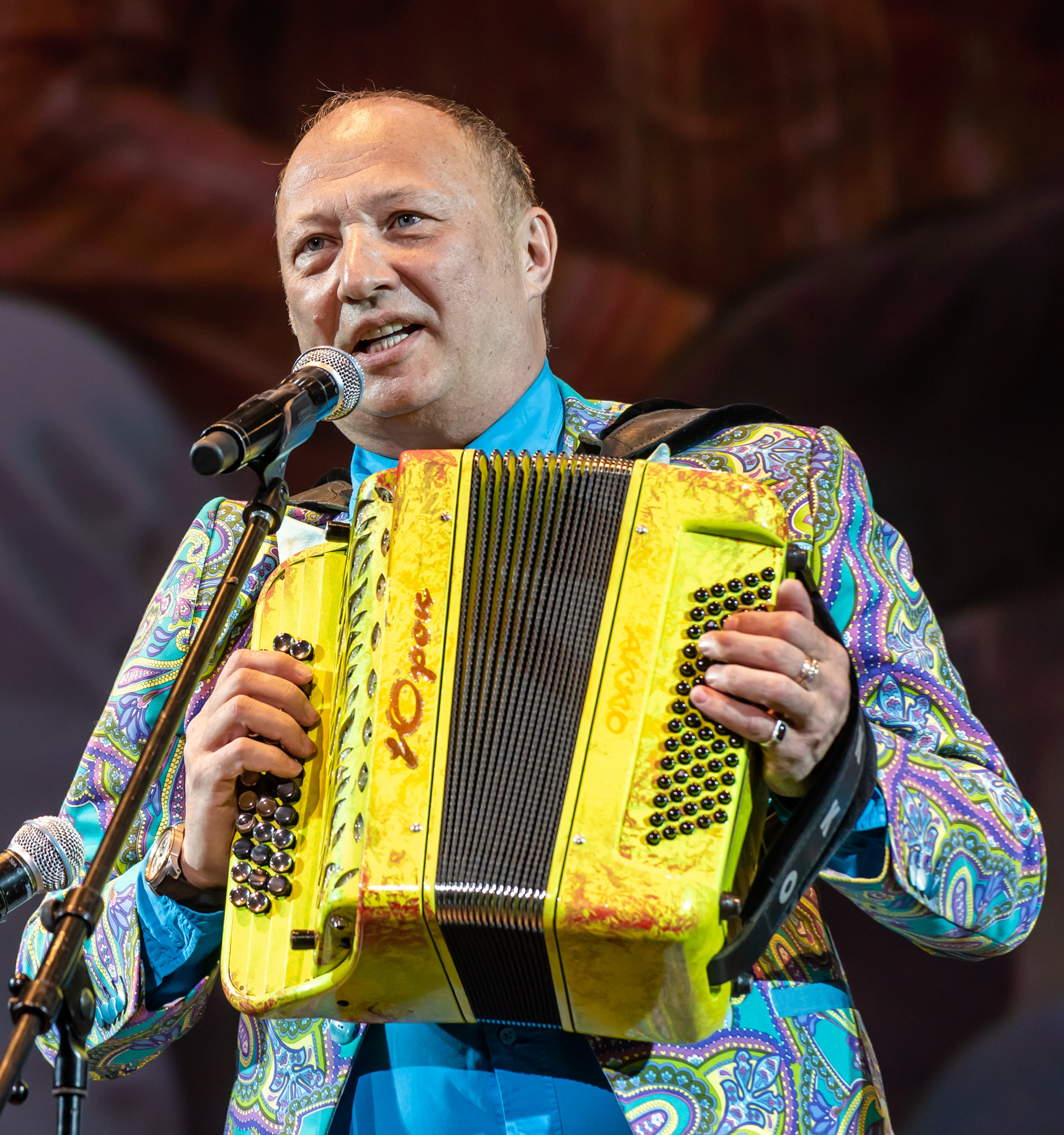 Юрий Гальцев на концерте группы Дискомафия (08.04.2019)